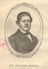 Prof. Dr. Med. František Jan Mošner